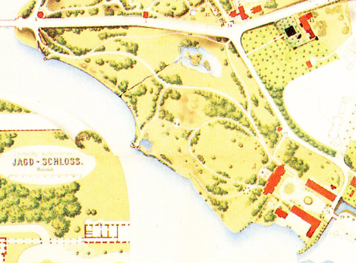 Kraatzplan 1862, Ausschnitt Jagdschlossgarten